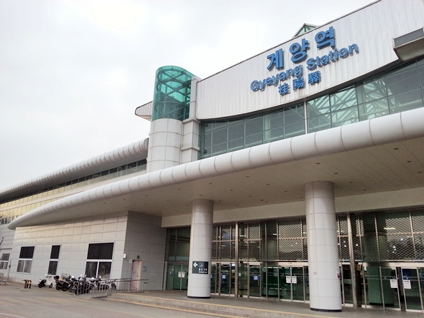 계양역